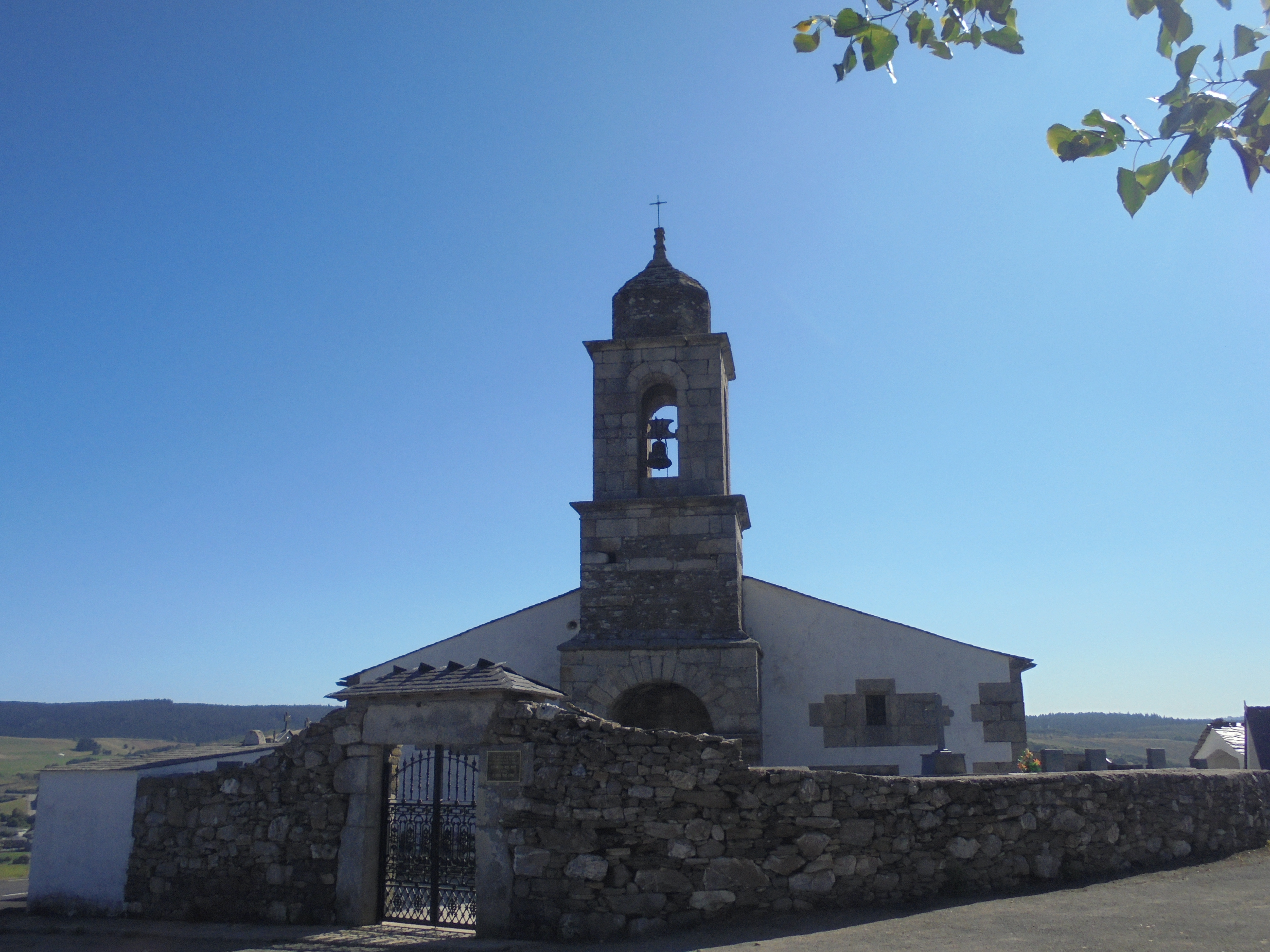 Igrexa parroquial de Pousada ( Baleira)